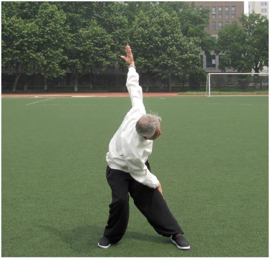 Abschnitte 5: Mit Wiegen und Wedeln die innere Hitze aus dem Herzen vertreiben